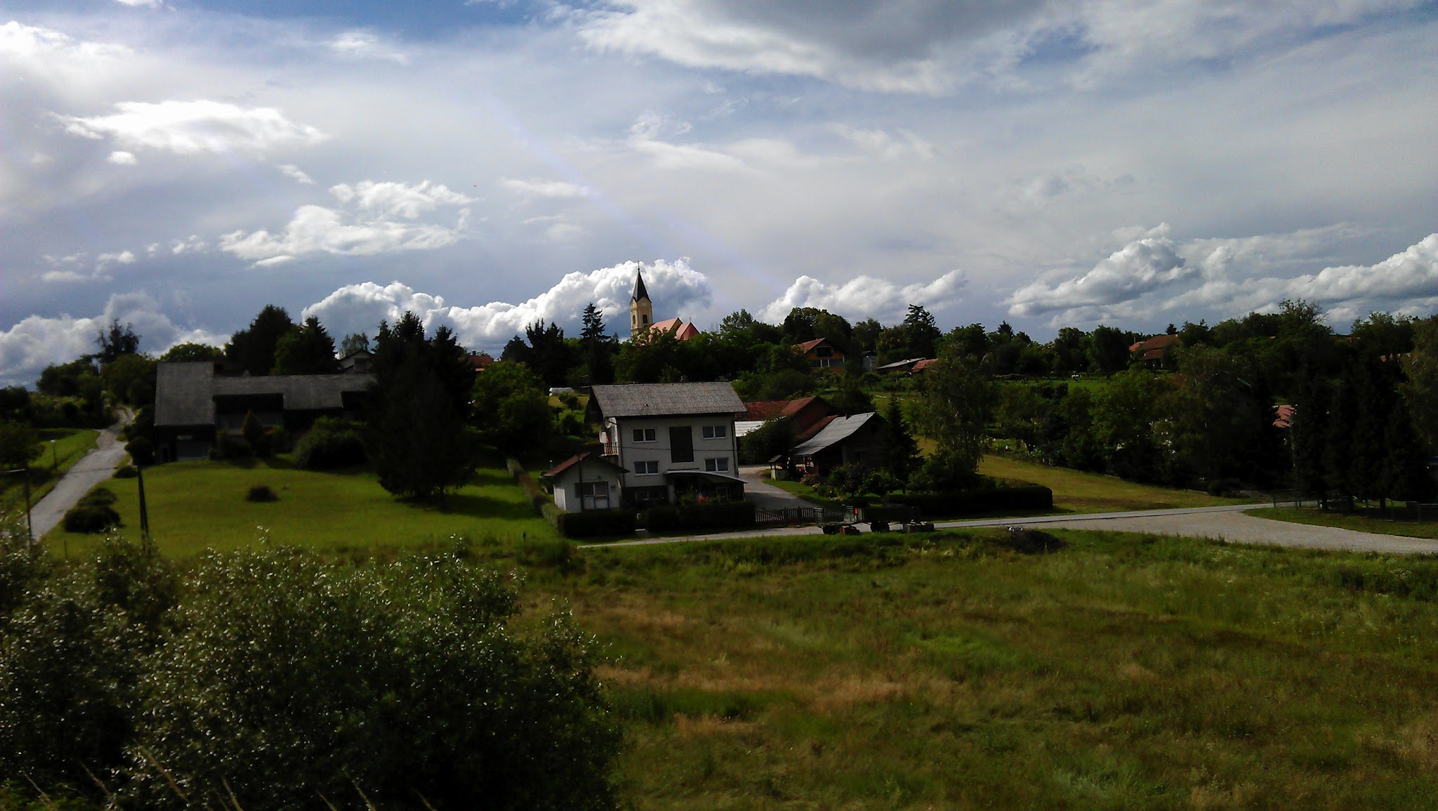 Gradec